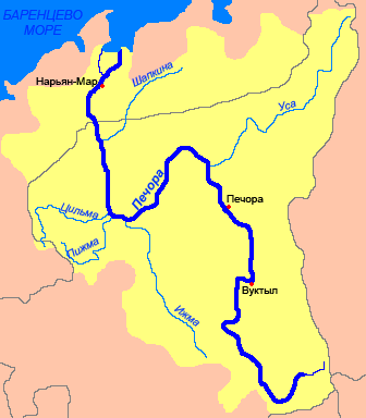 Карта Печоры